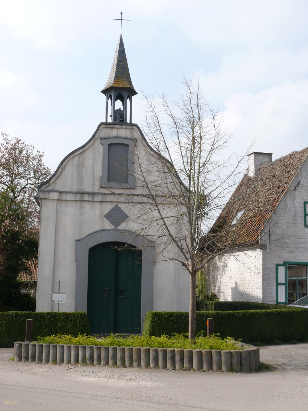 Knesselare Grote kapellestraat Kapelboom (3)